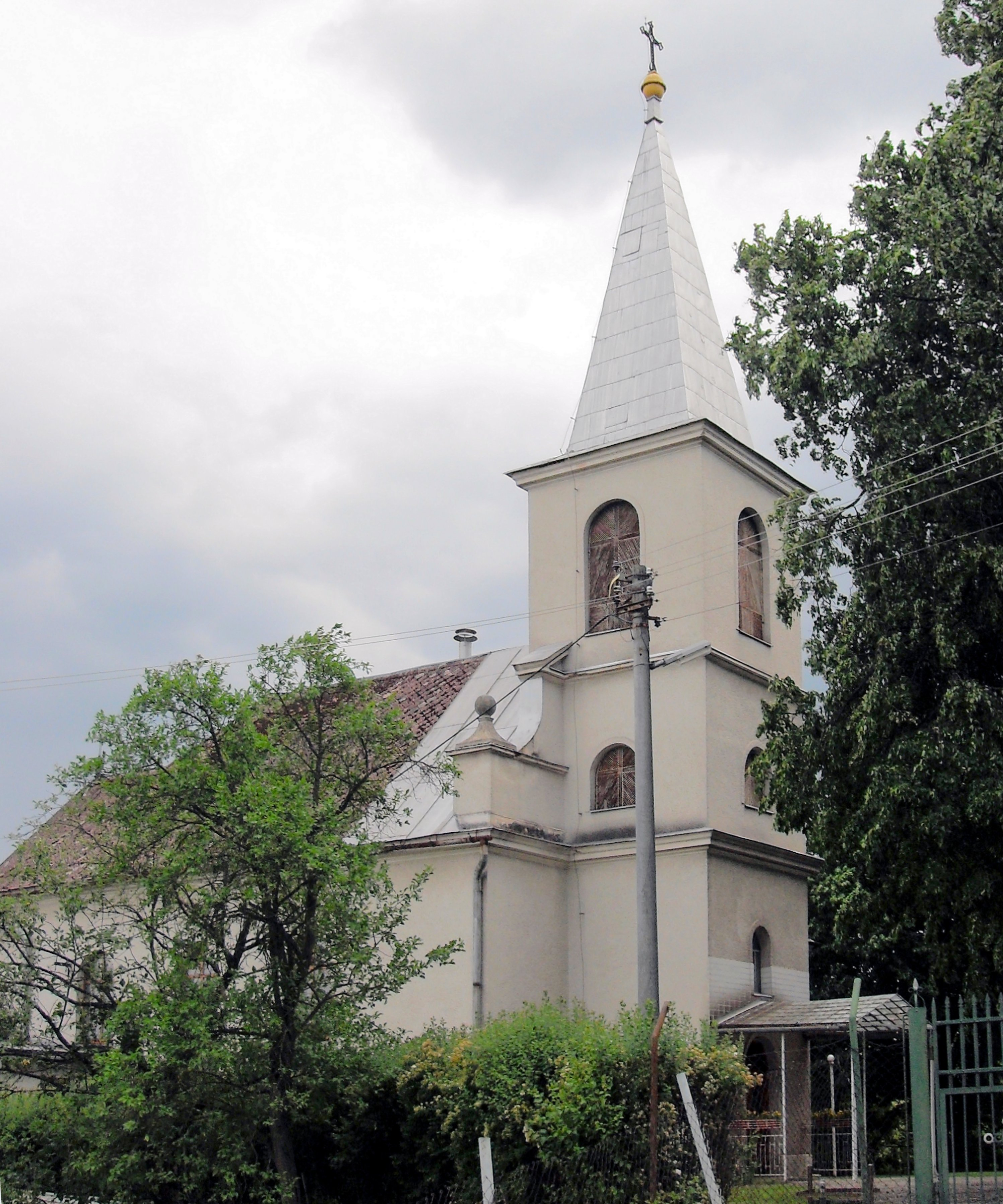 Janík, Farský kostol narodenia Panny Márie